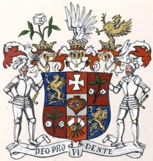 Dietzi suguvõsa aadli- ja vabahärravapp